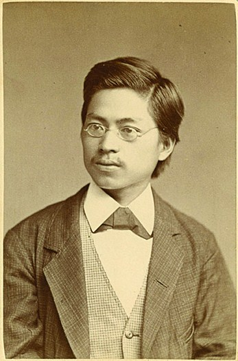 高嶺秀夫肖像（安政1年(1854)8月15日生、明治43年(1910)2月22日没）明治4年(1871)7月8日、慶應義塾入塾。慶應義塾初期教員。本邦師範教育の始祖。ペスタロッチ教育運動指導者。）